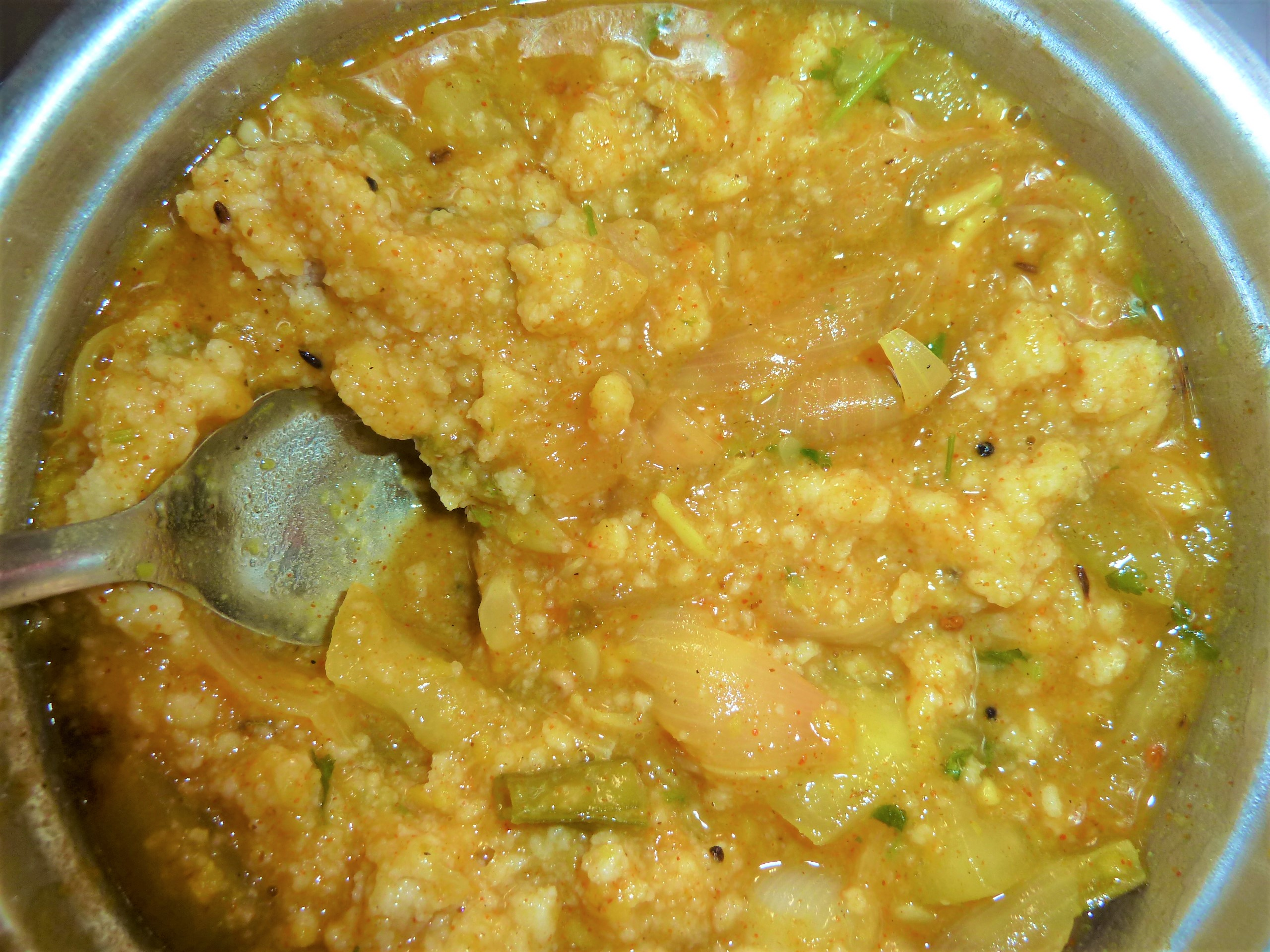 ఇడ్లీ సాంబారు